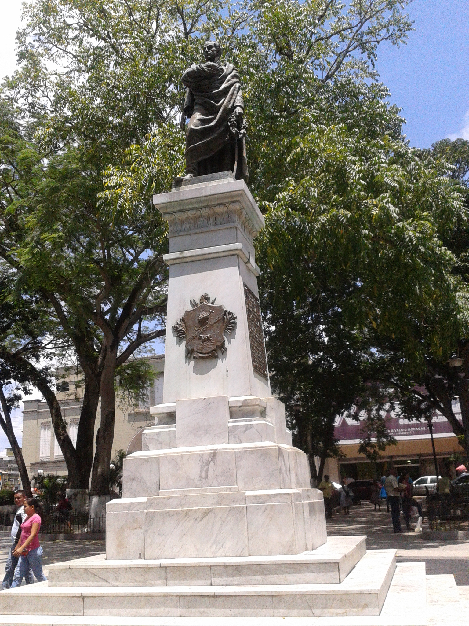 Vista de la estatua de Simón Bolivar, maturin, Venezuela.